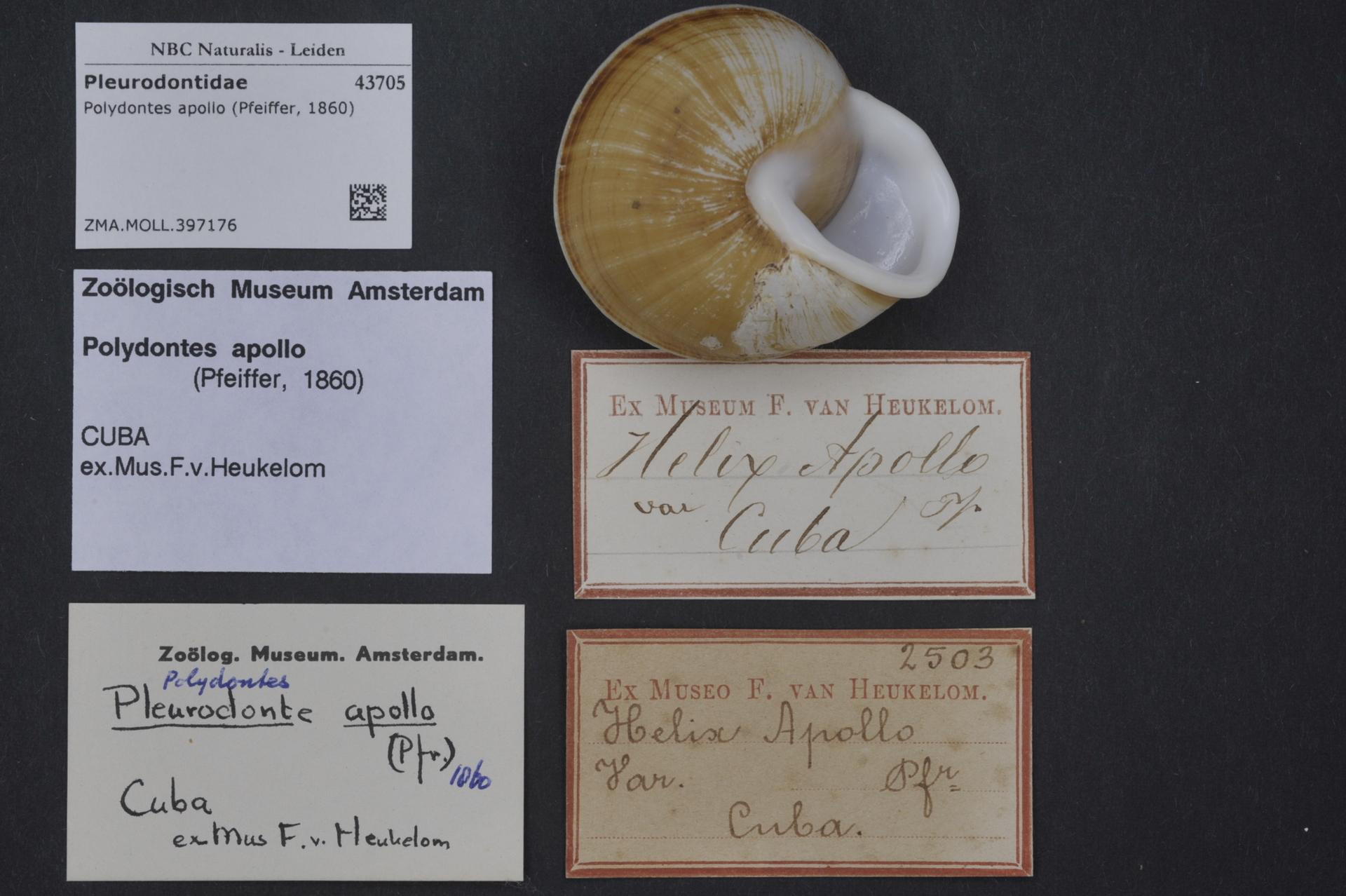 Polydontes apollo (Pfeiffer, 1860)